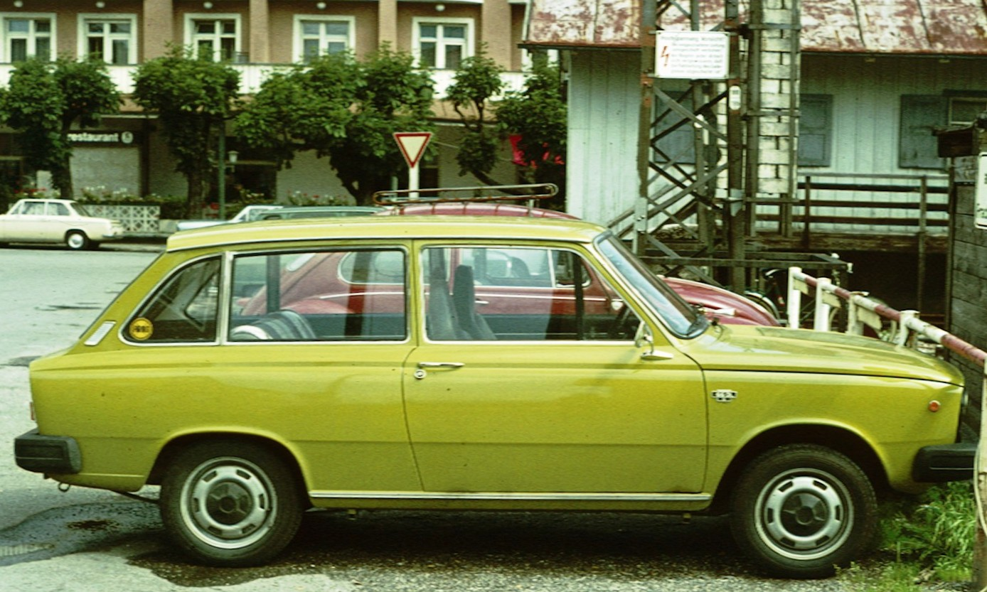 DAF 66 Break in Germany